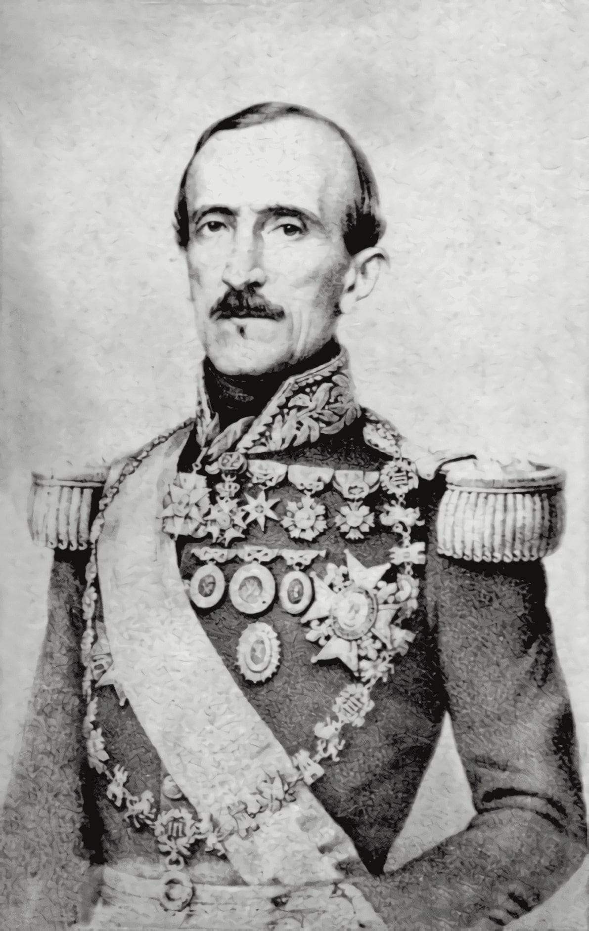 Foto No 149 Primer presidente del Ecuador, luego de la separación de la Gran Colombia. Nació en Puerto Cabello, Venezuela, en 1800. A los 15 años entró a las armas españolas, aunque más tarde pasó a las filas patrióticas. Sus dotes militares le permiten un vertiginoso ascenso, en 1824, como comandante general del ejército llega al Ecuador, donde desarrollara el resto de su carrera. En 1830, hace parte de los conspiradores que provocan la secesión del Ecuador y su declaración como Estado independiente. Flórez es elegido como el primer presidente. En 1831 intentó anexar a Cauca al Ecuador, pero fue derrotado por Obando y debilitado por revueltas internas. Se dedica entonces a conseguir la hegemonía militar en el Ecuador y fortalecer su gobierno, que será desde 1839 a 1851. Se ve obligado a exiliarse en Costa Rica. Regresa más tarde para tener una difícil relación con García Moreno, del que termina siendo aliado. Muere en 1864. BIBLIOGRAFÍA Ospina Vallejo, Joaquín, Diccionario biográfico y bibliográfico de Colombia, Bogotá, Editorial de Cromos, Editorial Aguila, 1927-1939, 3 v